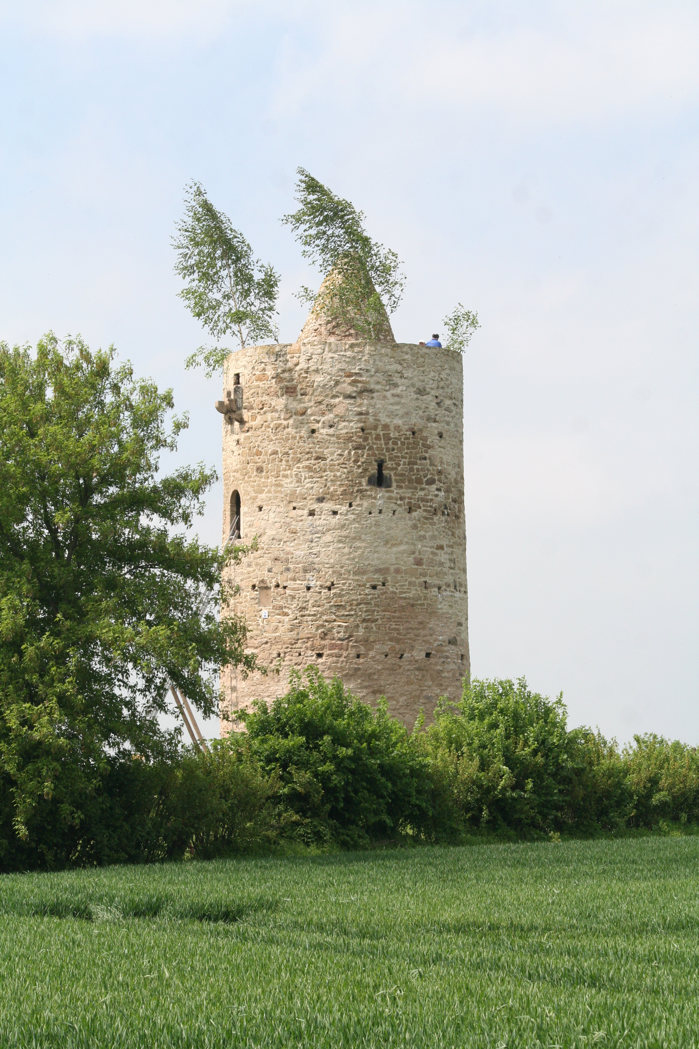 Eichstädter Warte